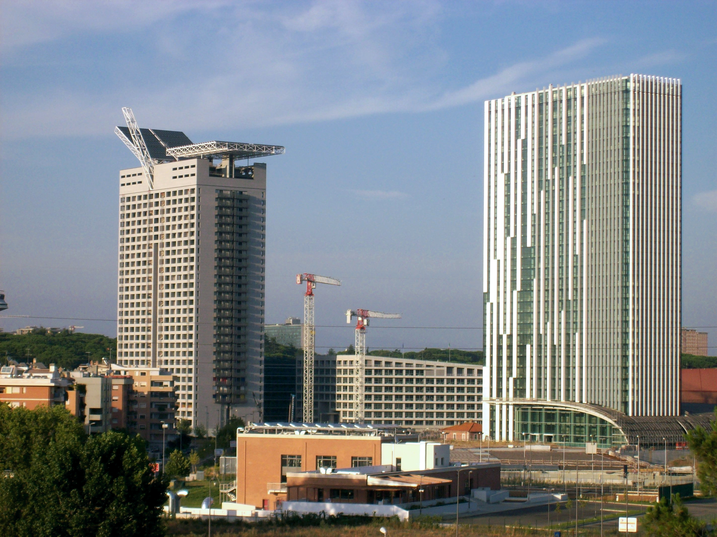 Le Torri Eurosky (a sinistra) ed Europarco (a destra) a Roma viste dalla collina del Torrino.